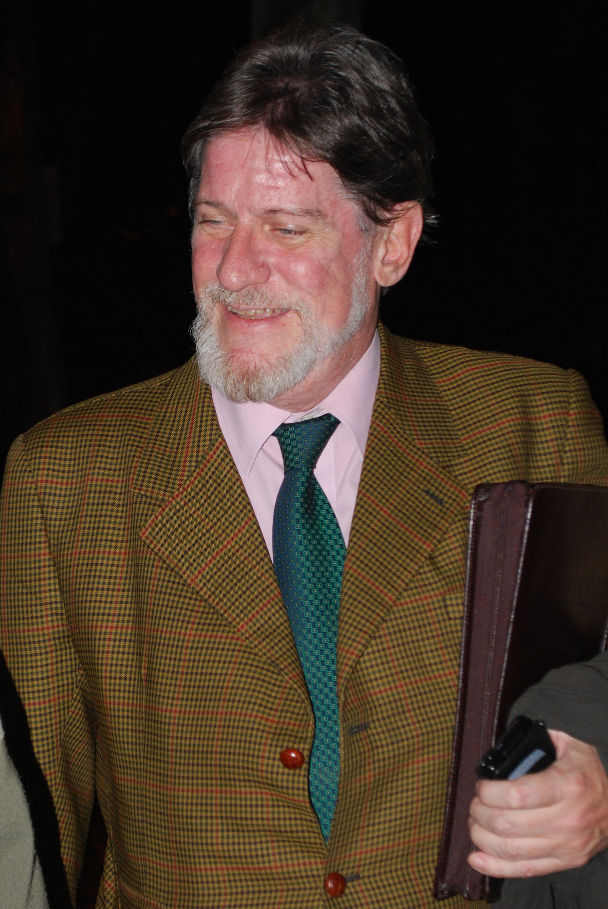 Fotografía del político de Uruguay, Luis Hierro López en el lanzamiento a la diputación por Montevideo de Gabriela Escotto.